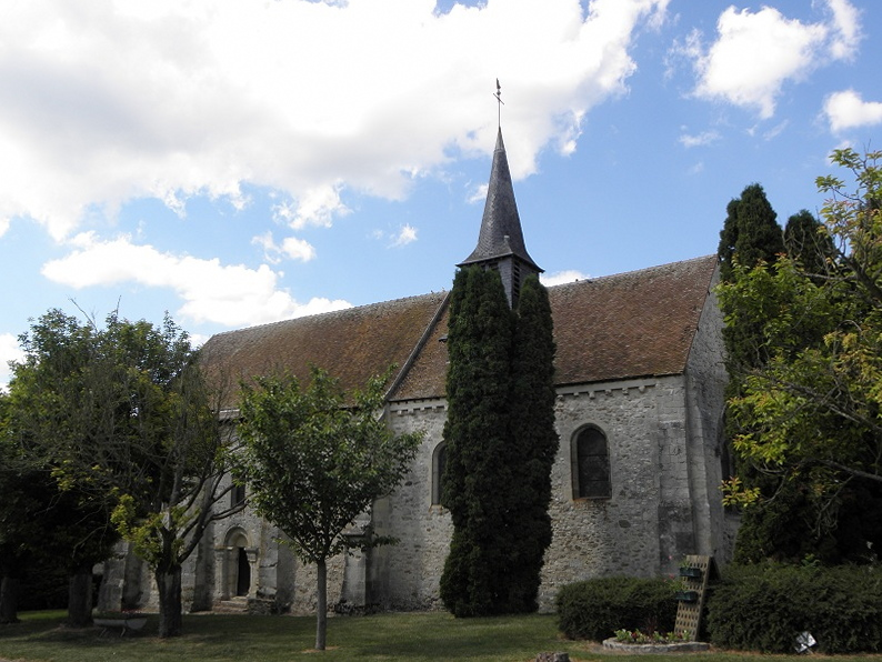 Vue méridionale de l'église Saint-Pierre et Saint-Paul de Passy-Grigny (51).